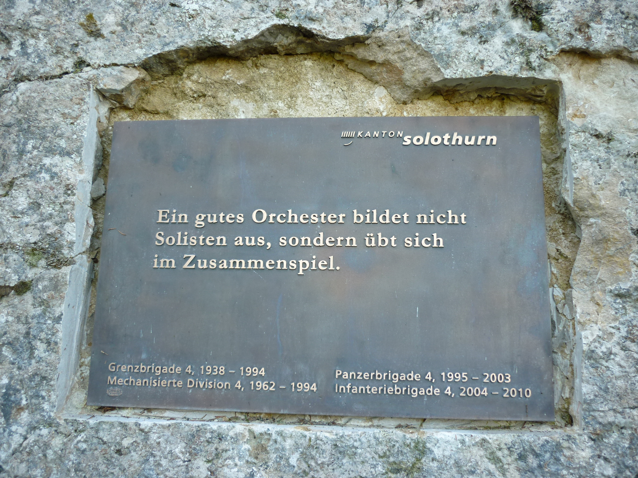 Gedenktafel für aufgehobene Armeeverbände, Passwang SO, Schweiz